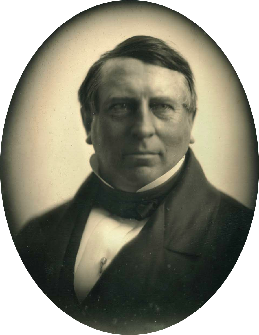 Daguerreotype: Verso, in graphite: "Baron James Rothschilde."